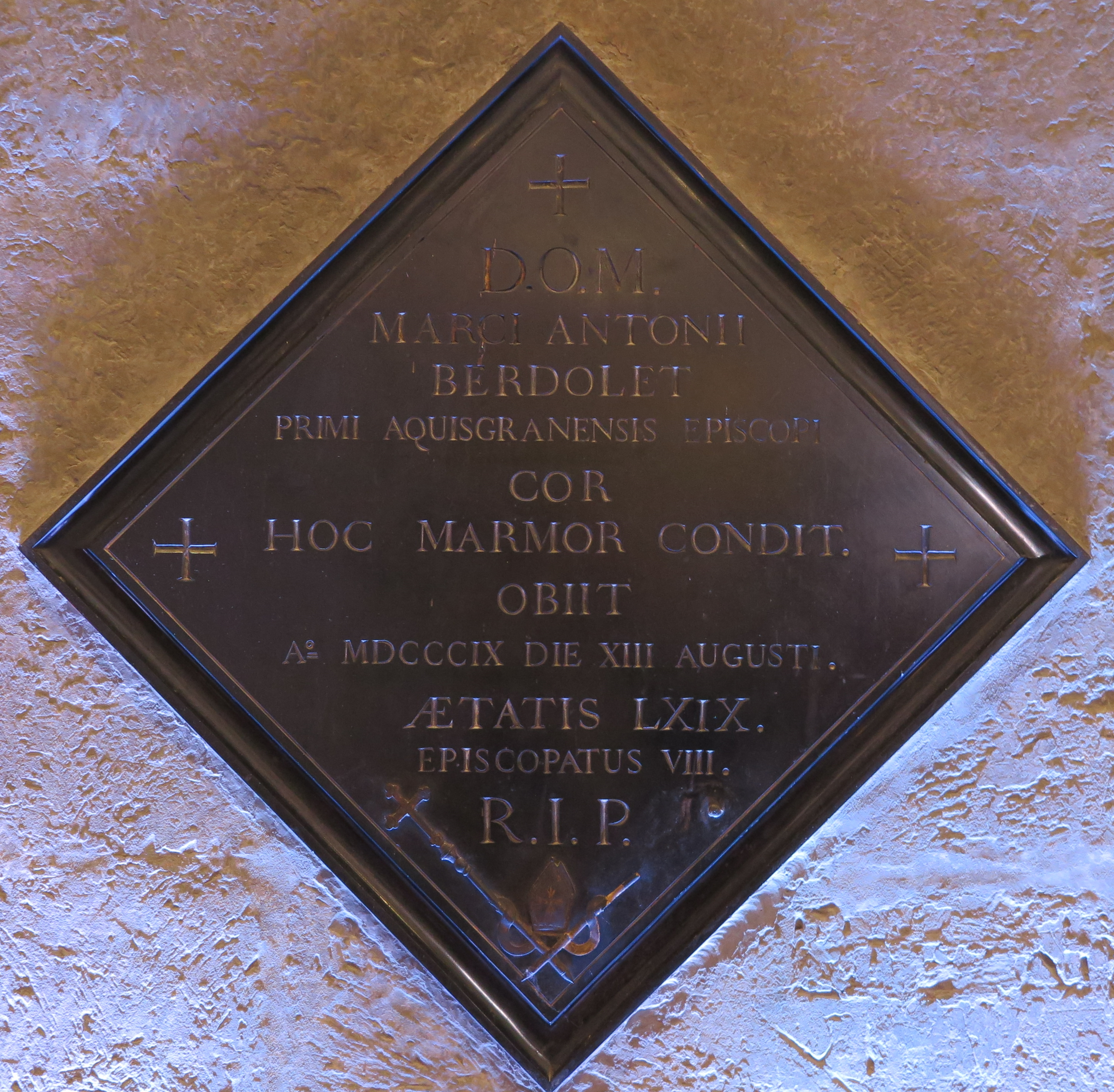 Gedenktafel an den ersten Aachener Bischof Marc-Antoine Berdolet in der Chorhalle des Aachener Doms.